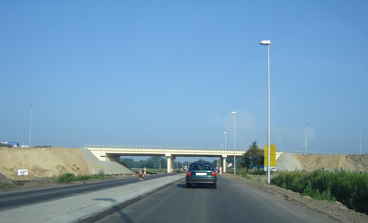 Droga krajowa 10 przed Stargardem Szczecińskim